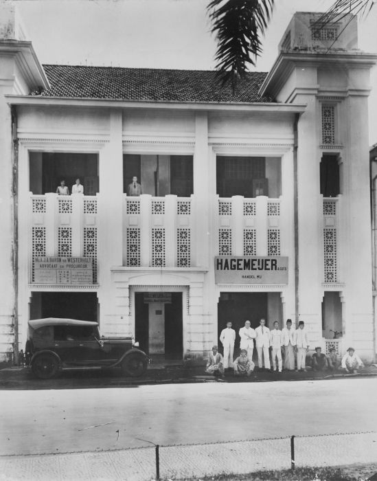 Foto. Groep heren en een auto voor het gebouw van Hagemeijer & Co's Handelmaatschappij